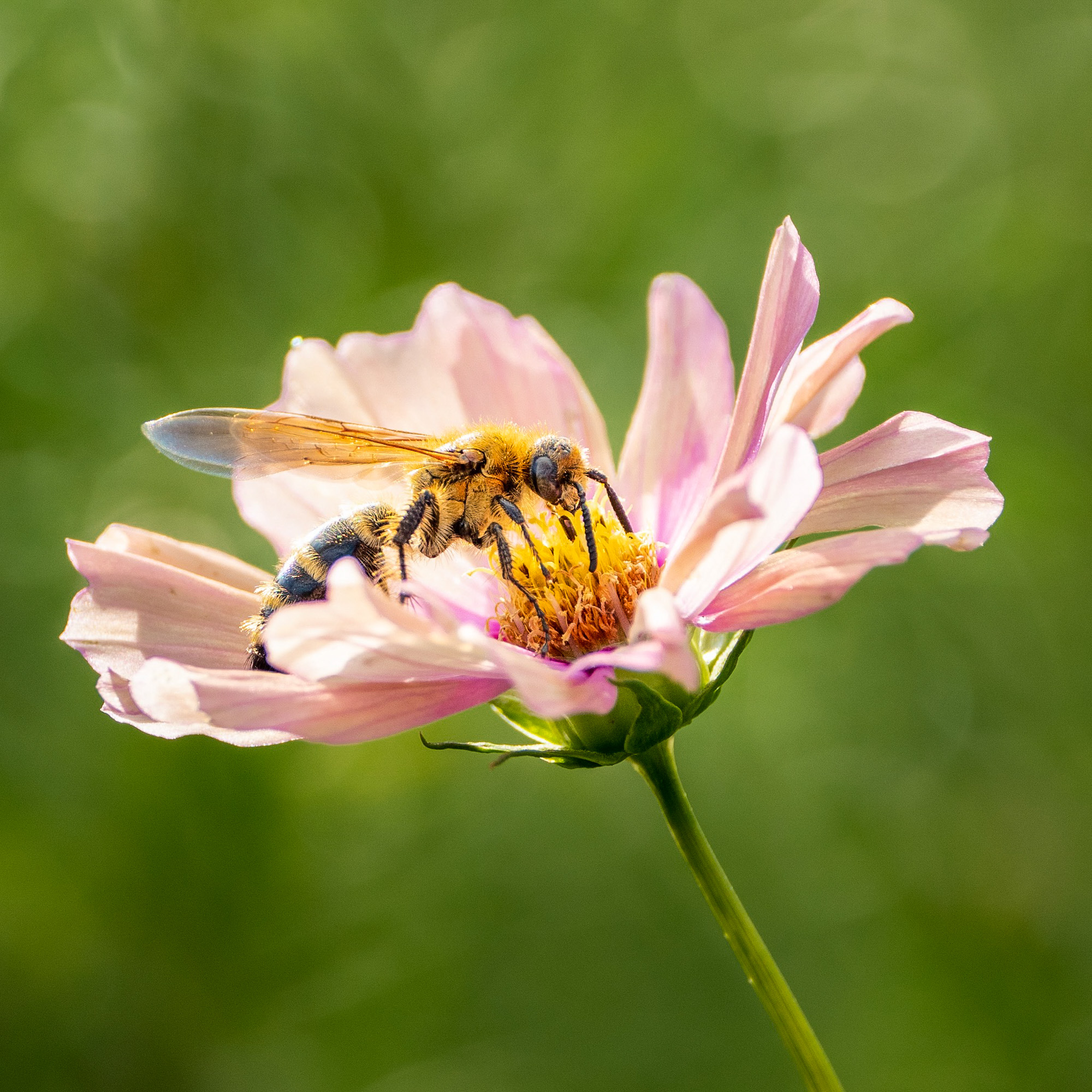 コスモスを吸蜜するキンケハラナガツチバチ。2019年10月28日、東京都立川市の昭和記念公園にて撮影